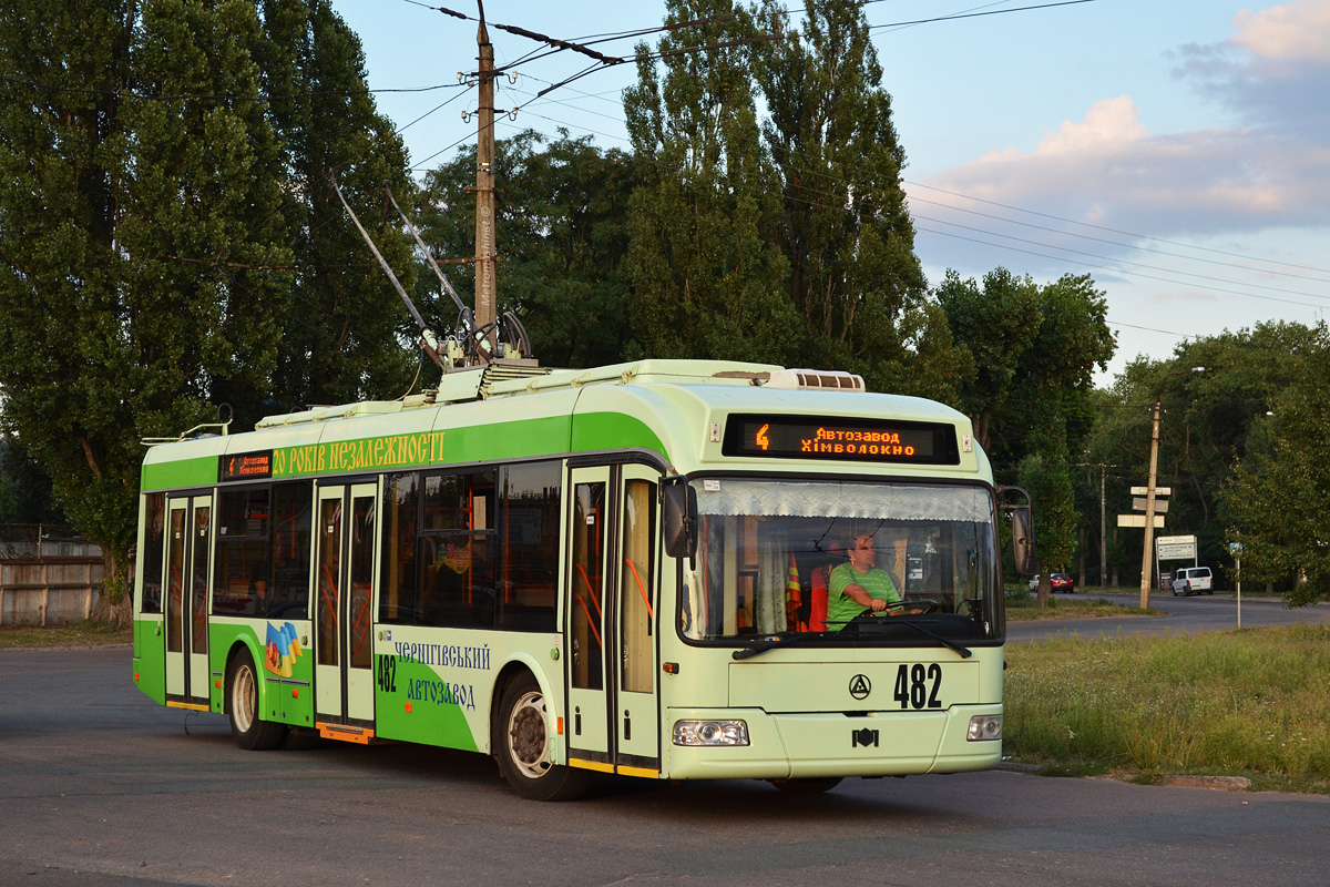 482_Chernihiv